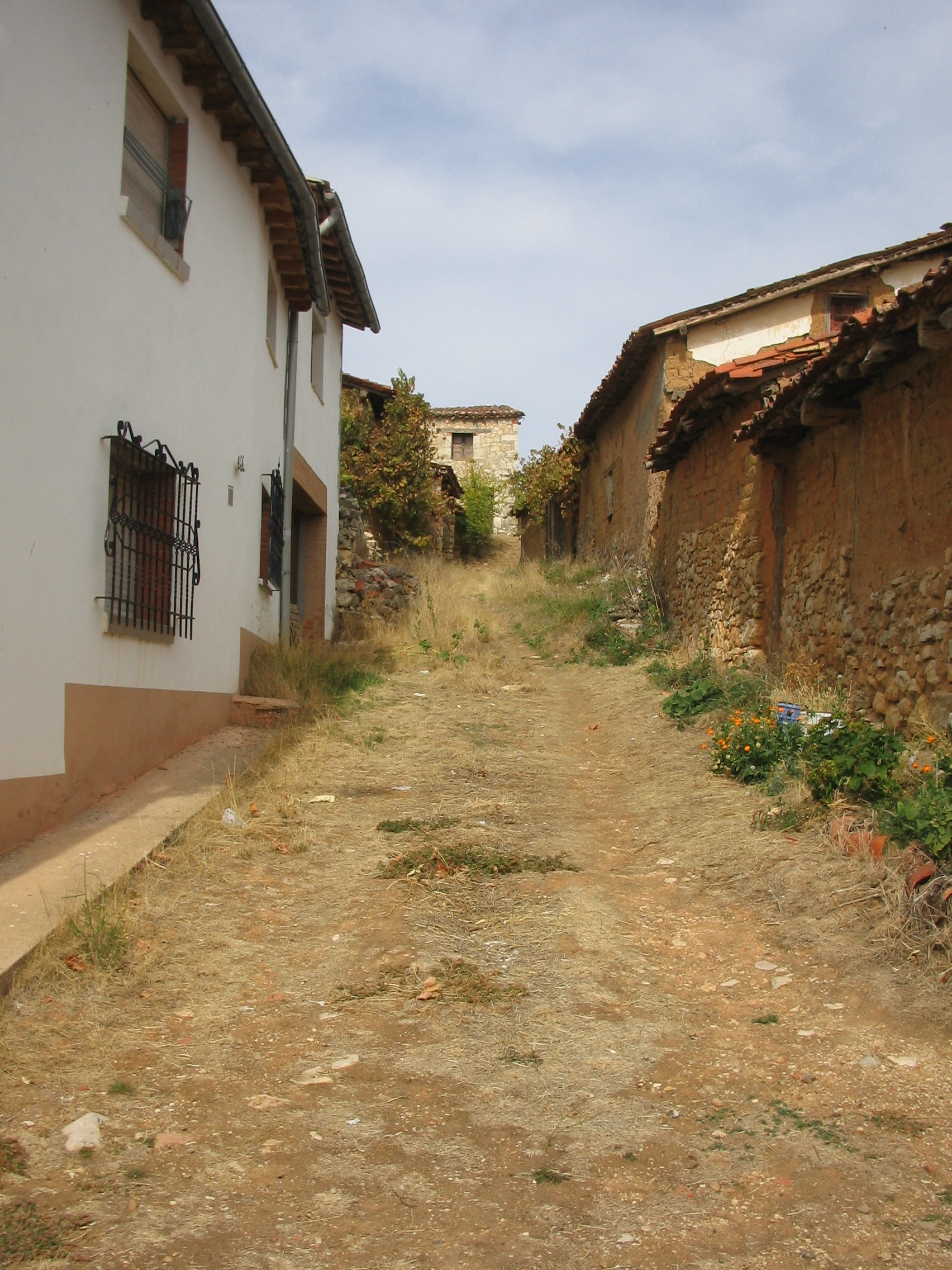 Calle de Santervás del Burgo (Soria)